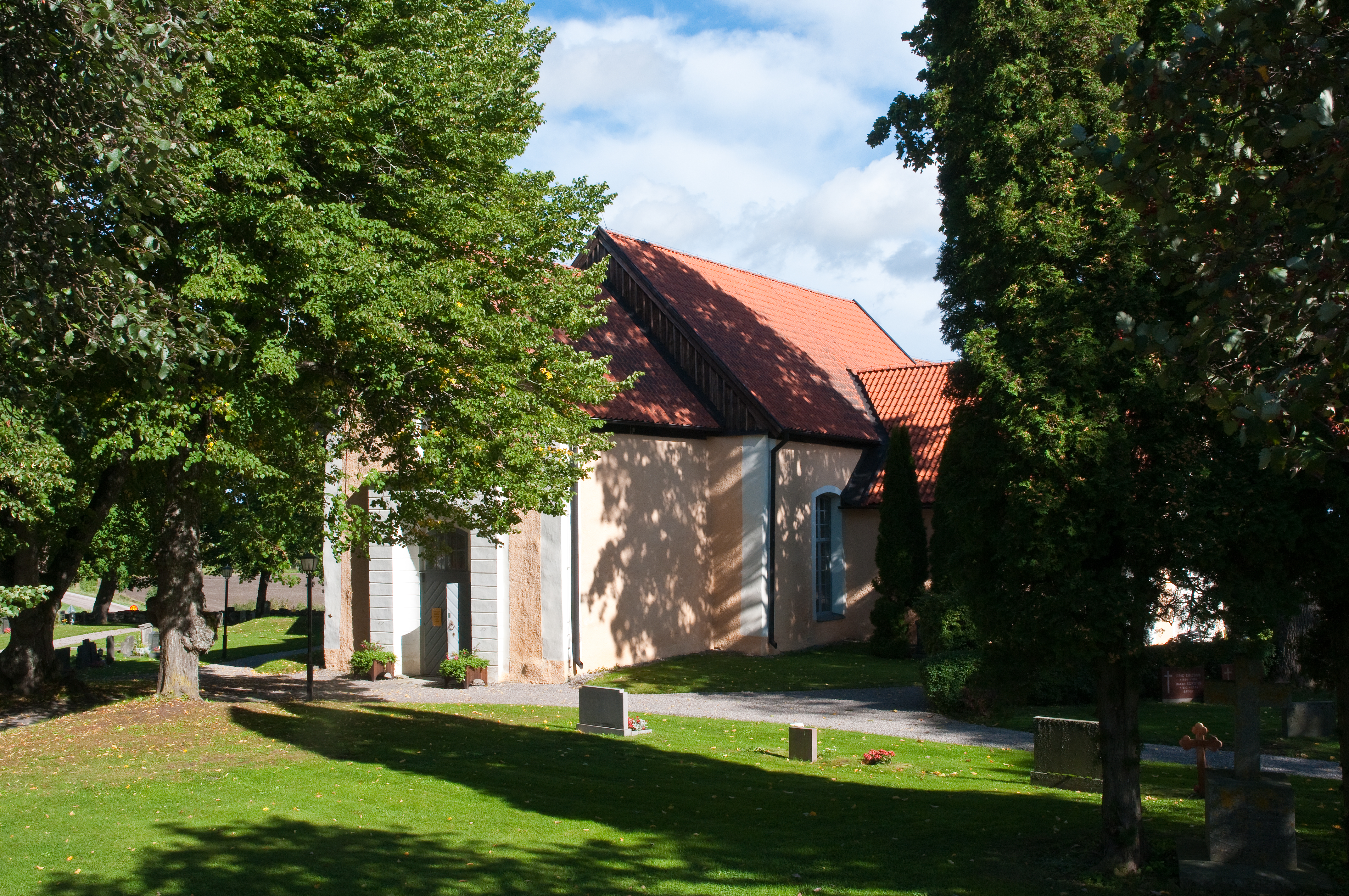 Runtuna kyrka i Nyköpings kommun